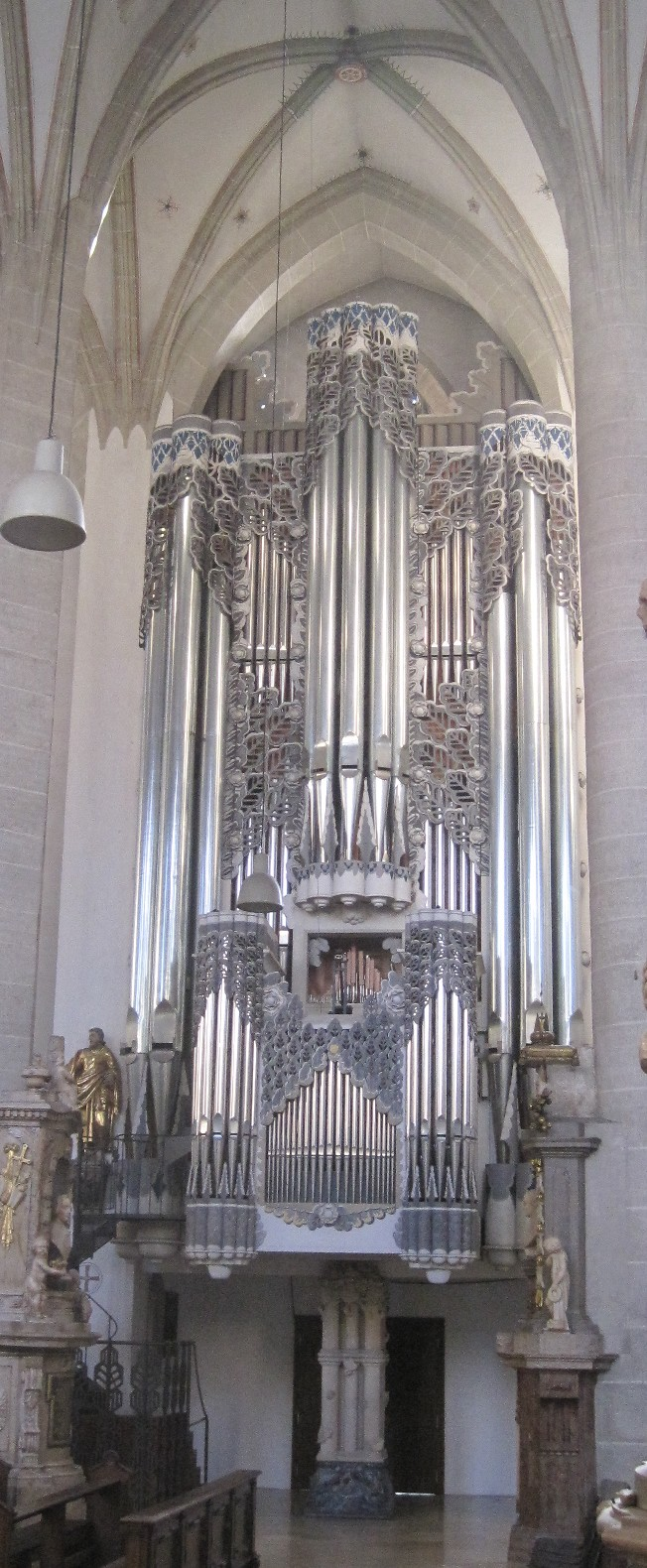 Orgel des Doms in Eichstätt